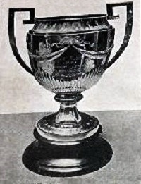 La Coupe de l'empereur Guillaume II, offerte au vainqueur de Paris-Berlin 1901 - La Vie au Grand Air n°147 du 7 juillet 1901, p.385